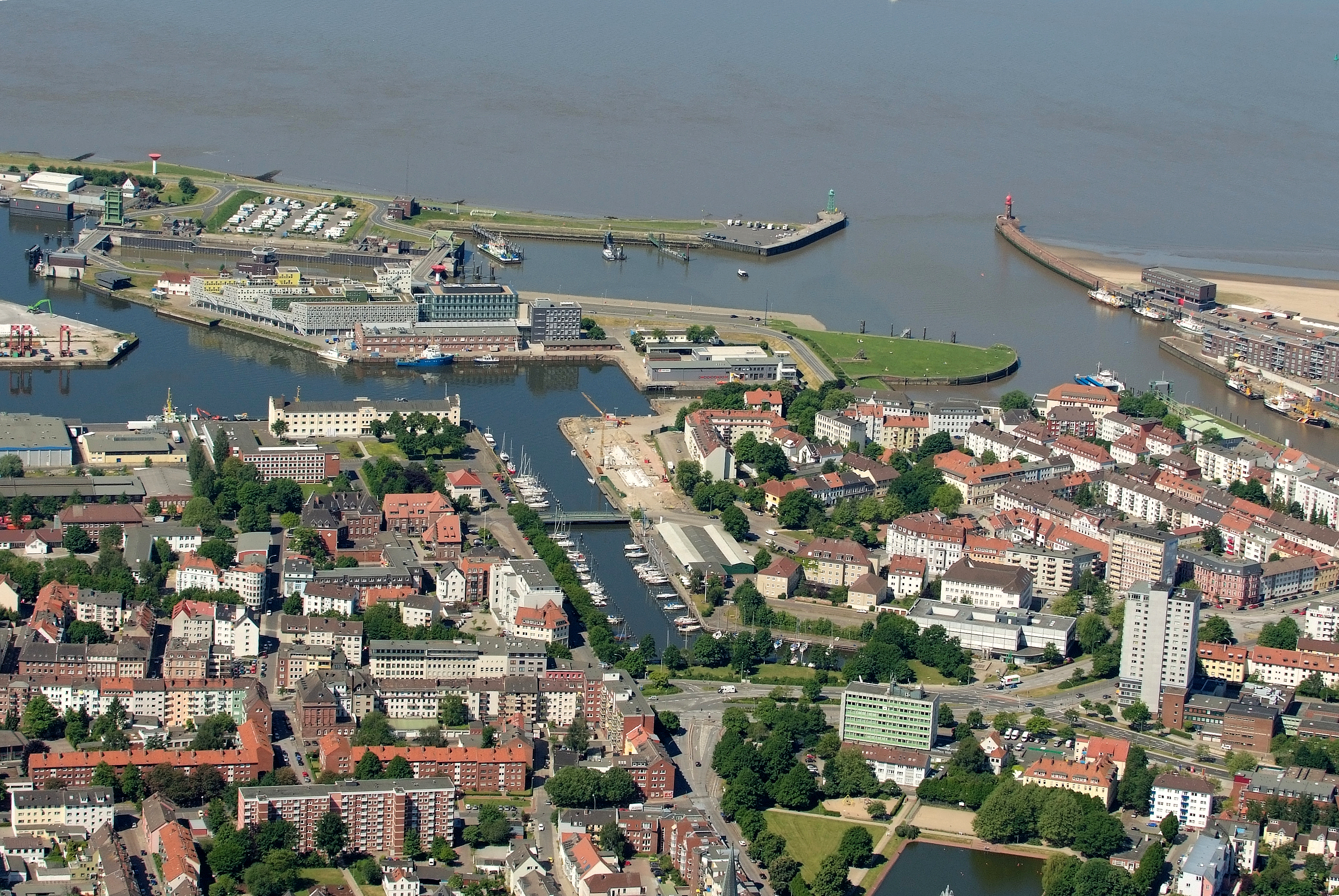 Fotoflug vom Flugplatz Nordholz-Spieka über Cuxhaven und Wilhelmshaven Bremerhaven-Geestemünde, Blick von Osten, oben die Weser